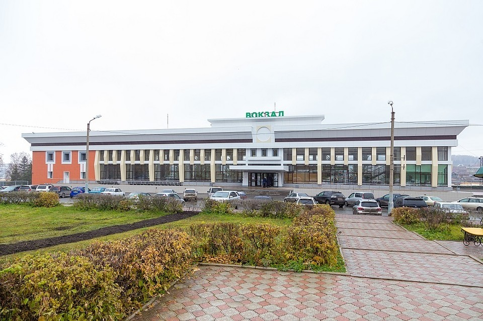 Железнодорожный вокзал Ачинск 1(2017)